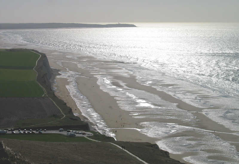 Cap Gris Nez France